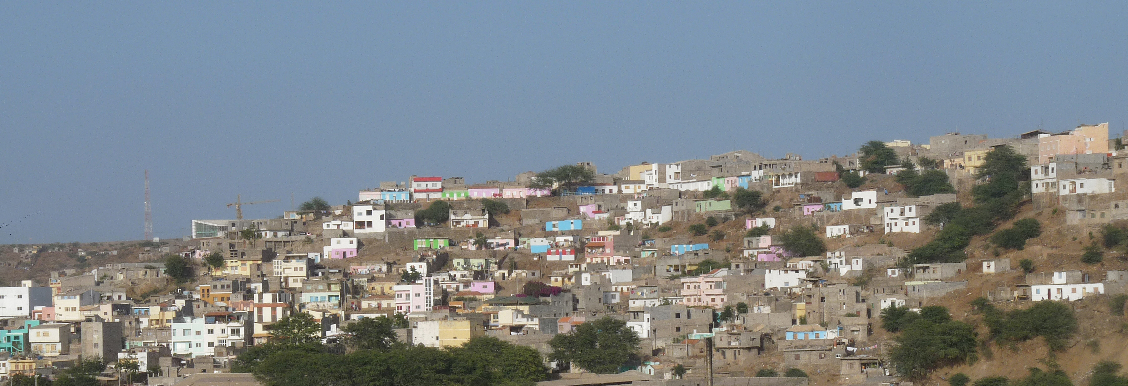 Praia (Cap-Vert) : Maisons colorées de Achada Grande